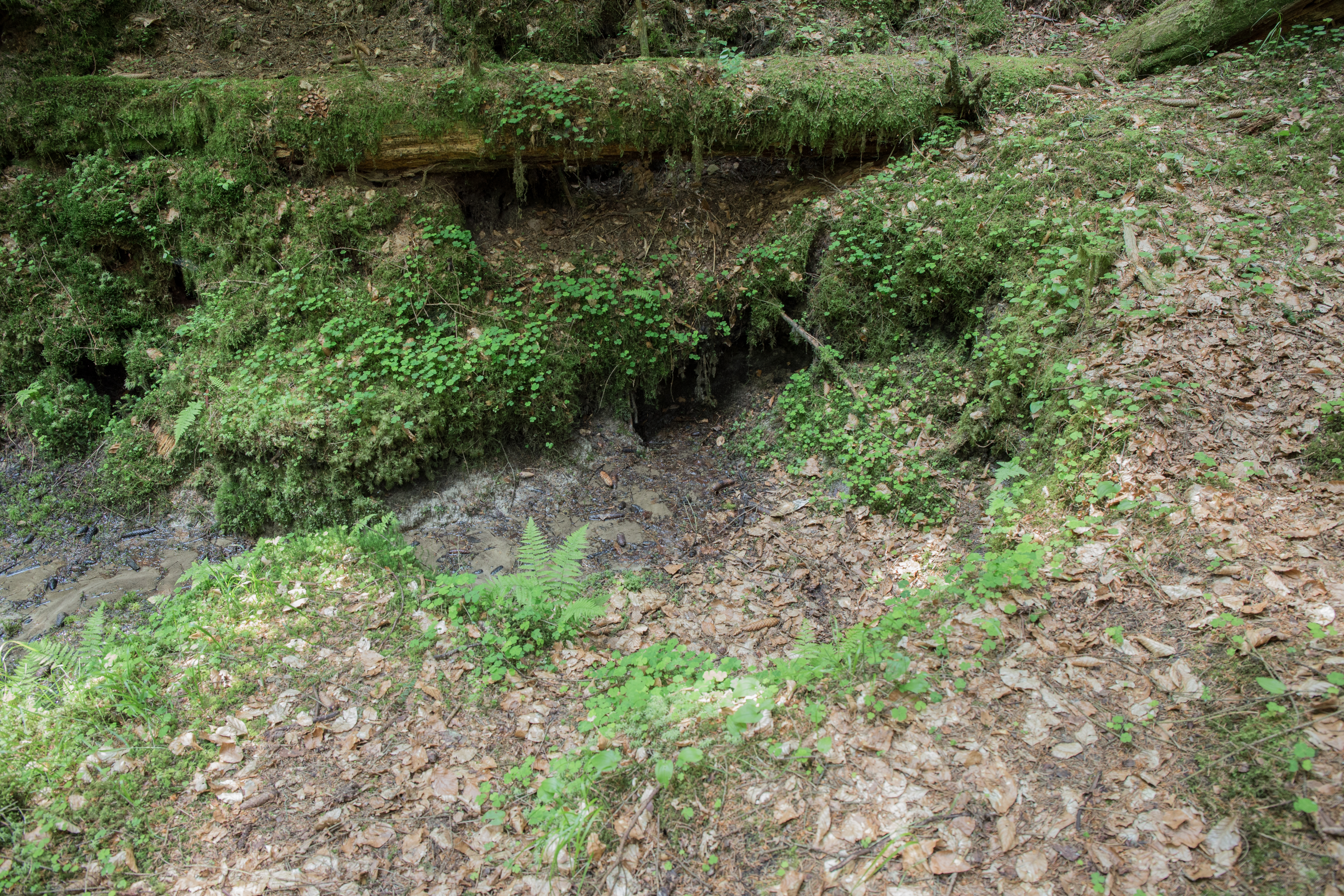 Ponorloch der Doline Teufelsbrunnen